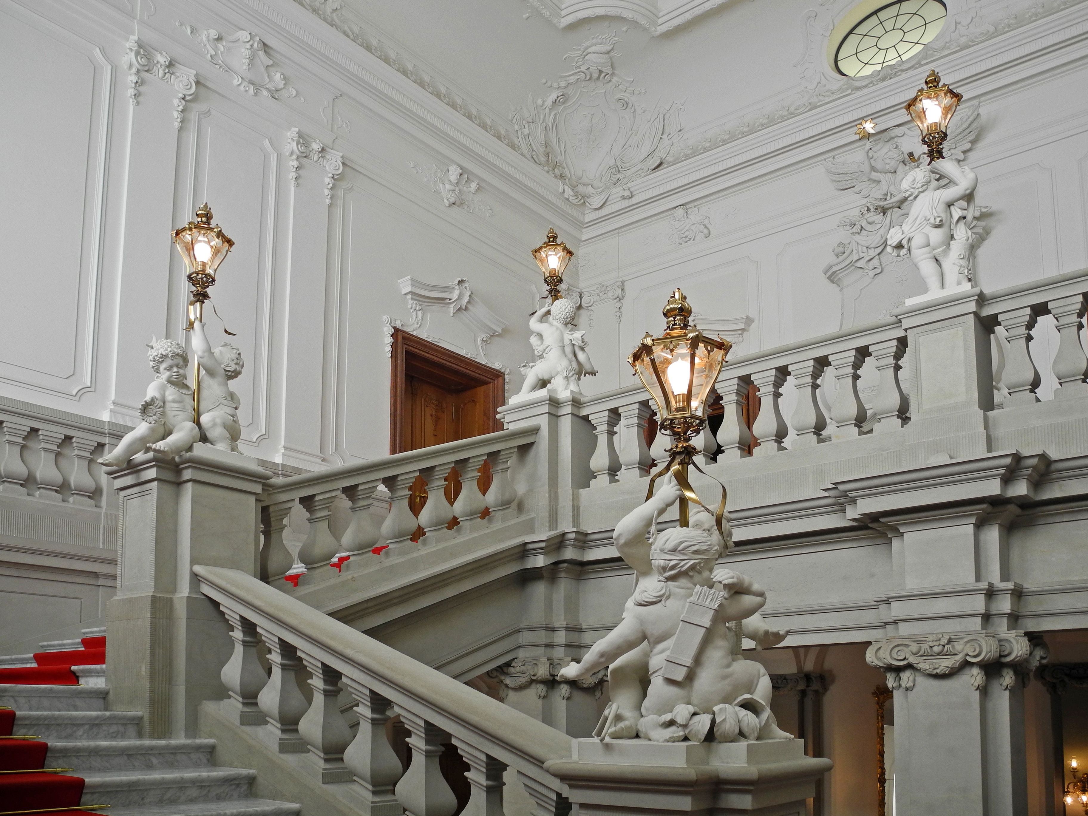 Englische Treppe im Residenzschloss Dresden mit vier Puttengruppen als Allegorie auf die vier Erdteile